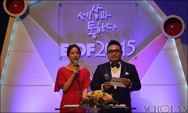 제12회 EBS국제다큐영화제(EIDF 2015) 개막식